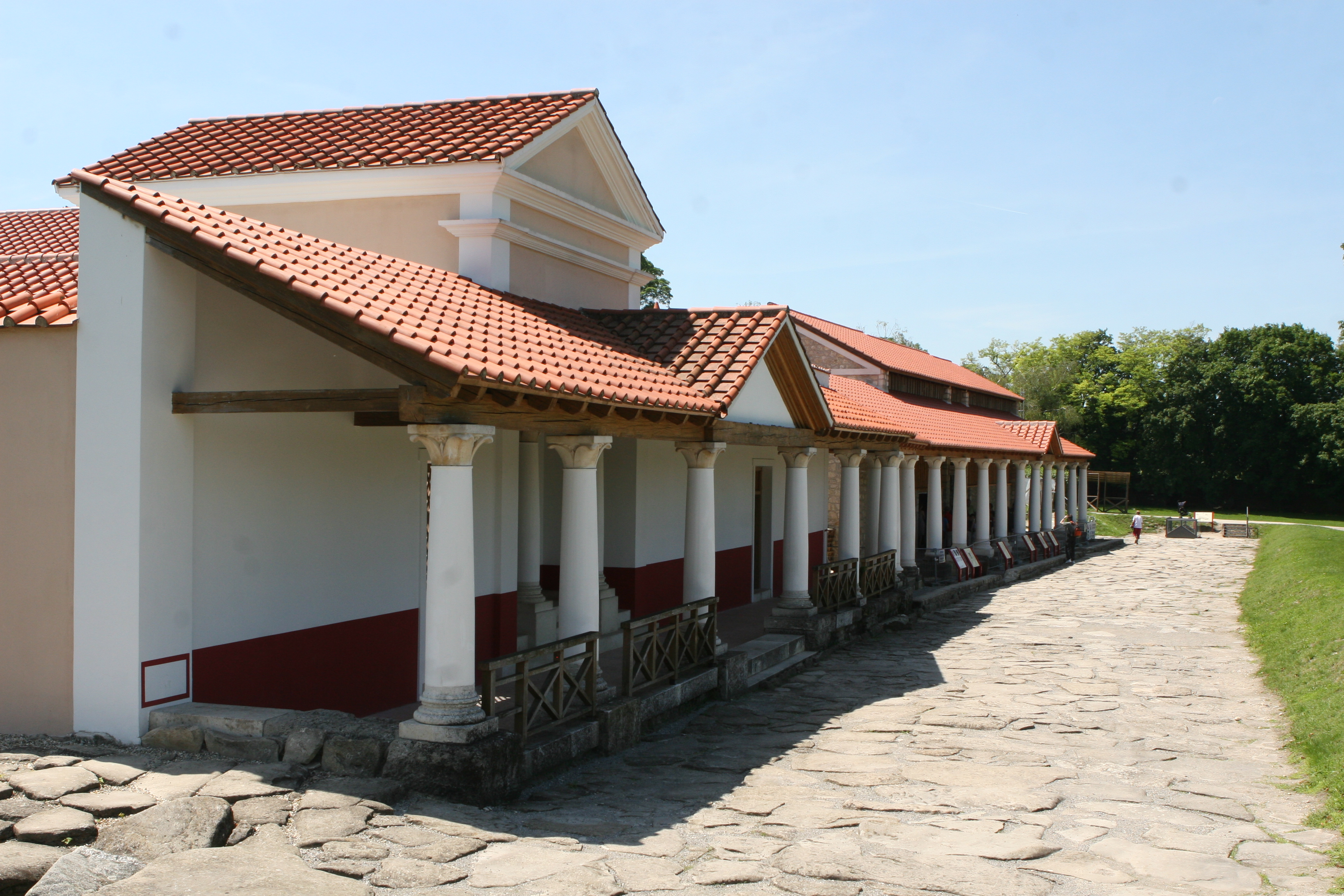 ART CARNUNTUM Dieses Bild wurde anlässlich des österreichischen Tags des Denkmals 2012 in Niederösterreich eingereicht.